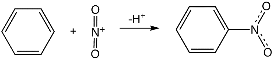 nitration of benzene equation